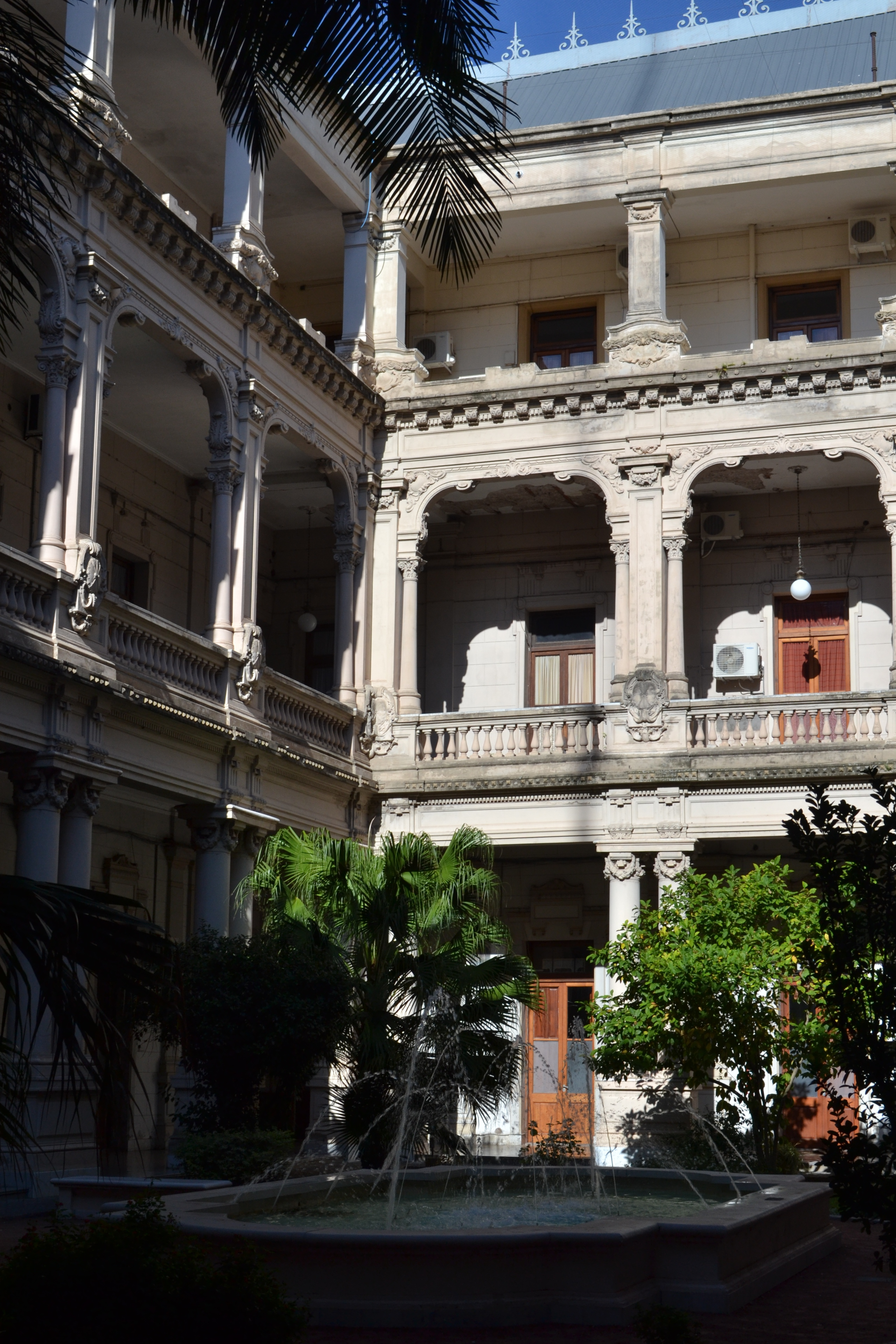 Casa de Gobierno de Santa Fe, patio interno y galerías.